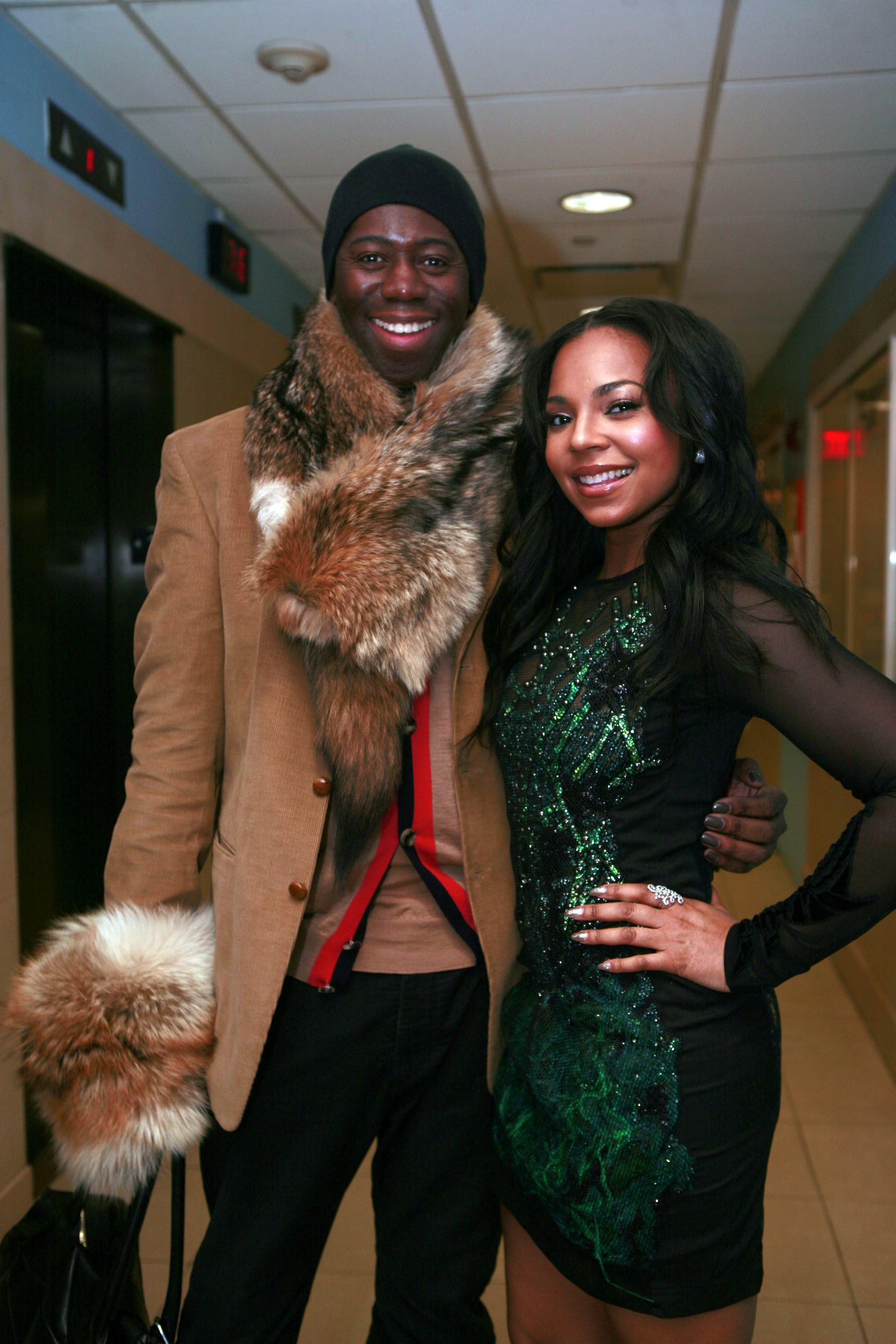 J Alexander and R&B singer Ashanti